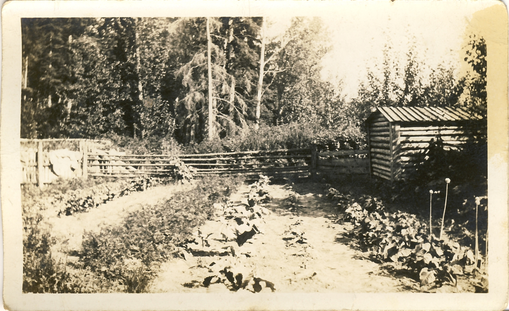 Naumann Georg Garten mit Naturgas-Fackeln